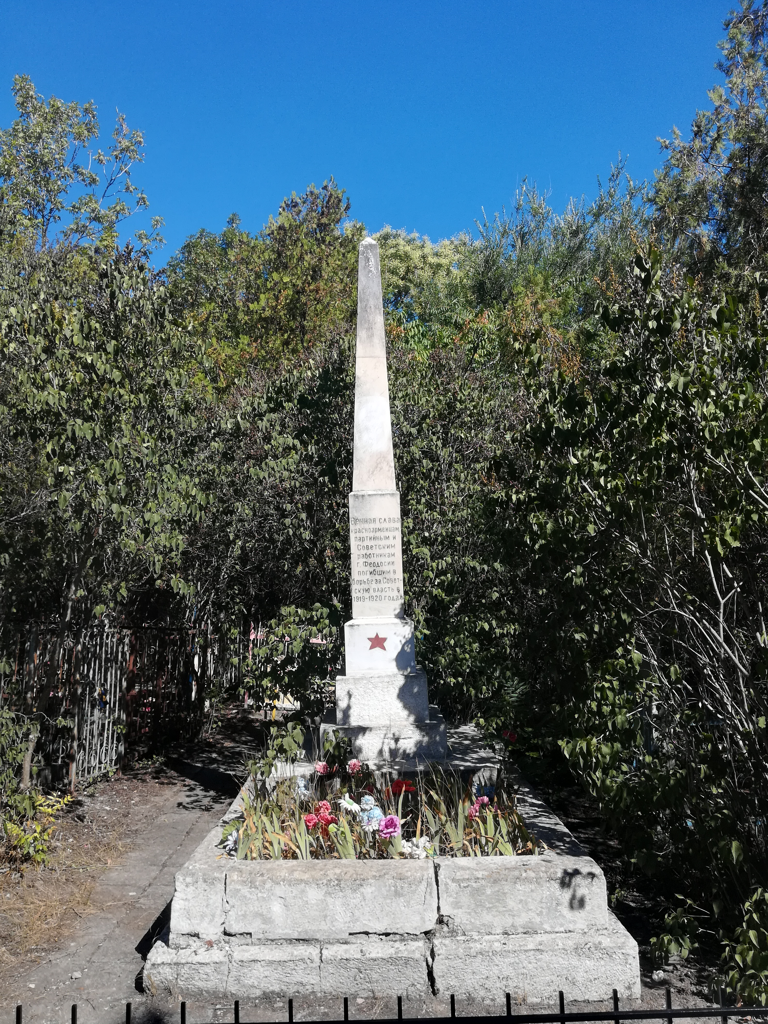 Старое кладбище Феодосии